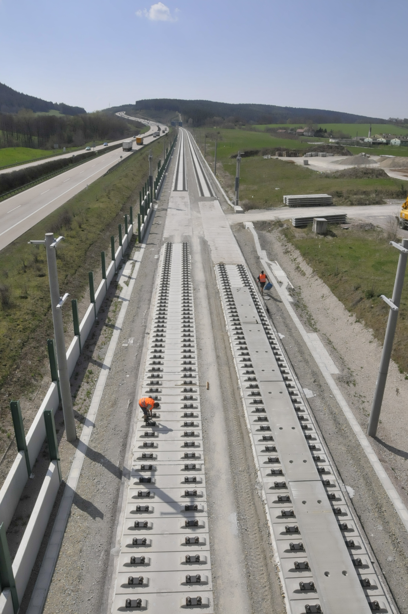 Neubaubahnstrecke Erfurt-Nürnberg im Bereich Behringen, Blick nach Süden